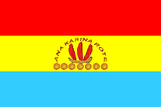 Bandera del municipio Guaicaipuro, estado Miranda, Venezuela